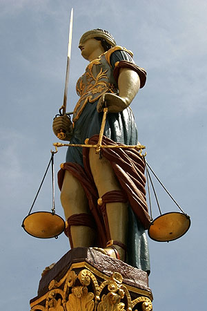 Biel: Gerechtigkeitsbrunnen (Burgplatz)